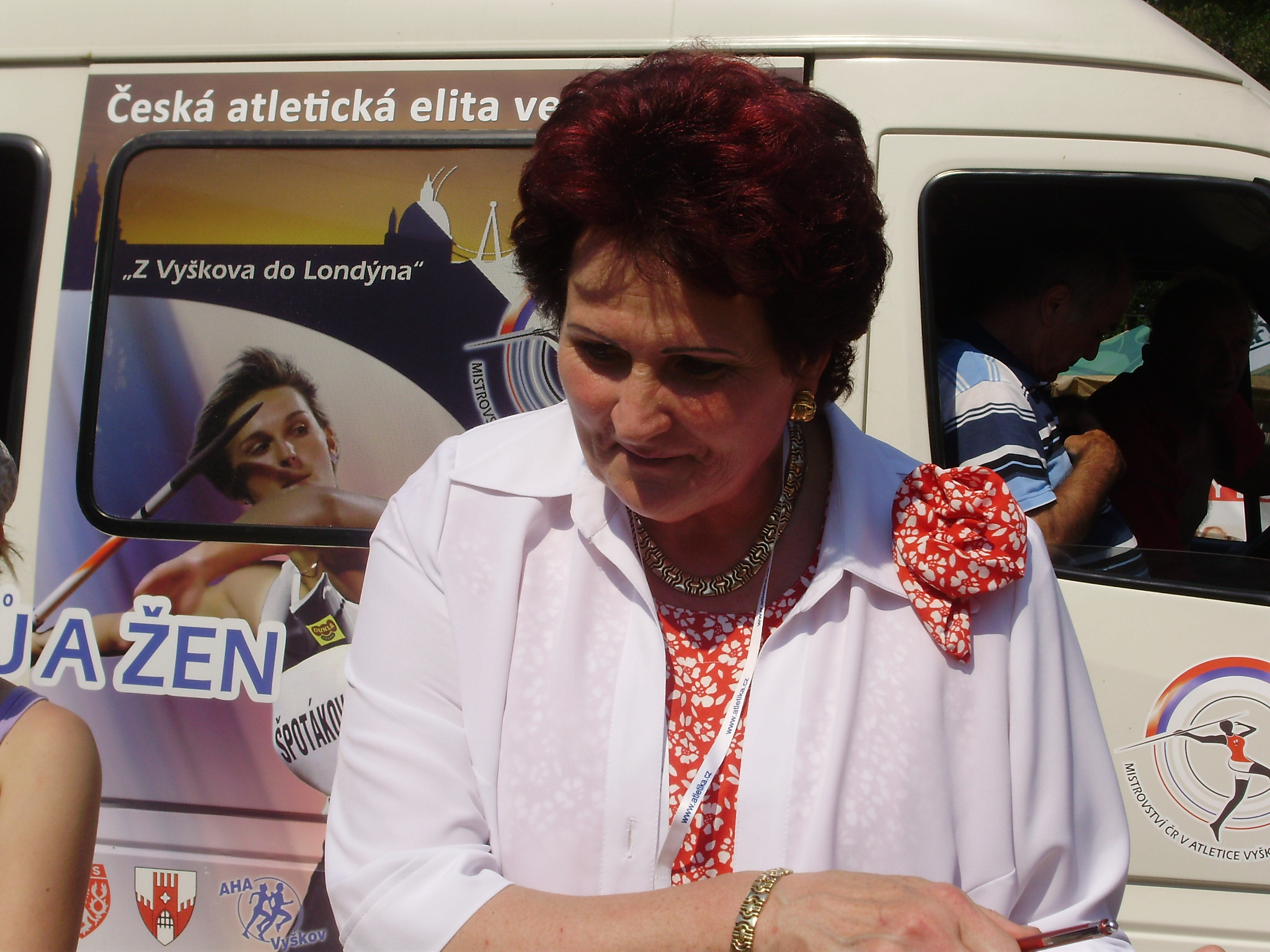 Helena Fibingerová Vyškov 2012